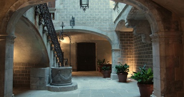 El Museo Palau Solterra es el Museo de Fotografía Contemporánea (de autores nacional e internacional) de la Fundació Vila Casas ubicado en la localidad Empordanesa de Torroella de Montgrí.